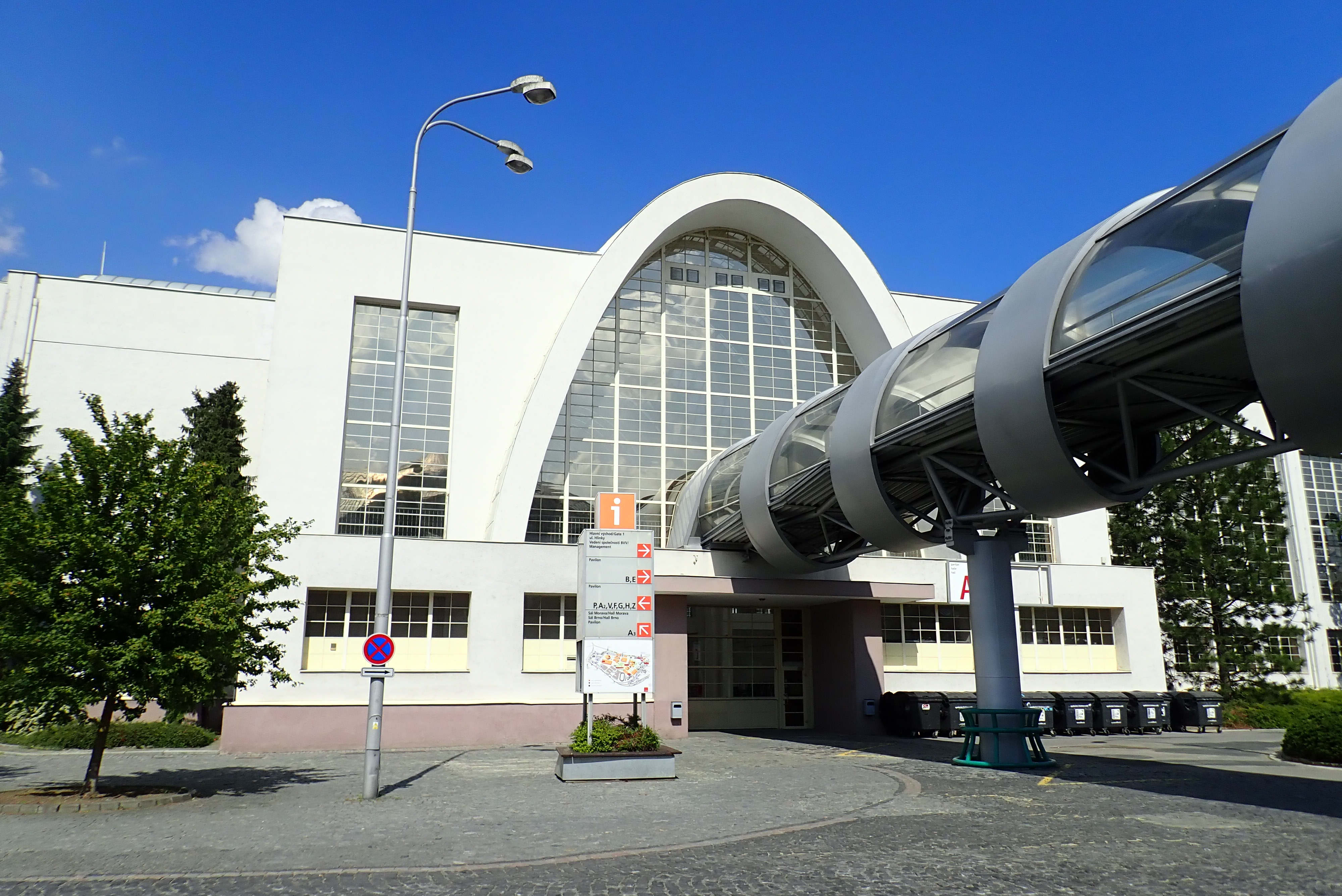 Vstupní portál pavilonu A s propojovacím mostem z pavilonu C